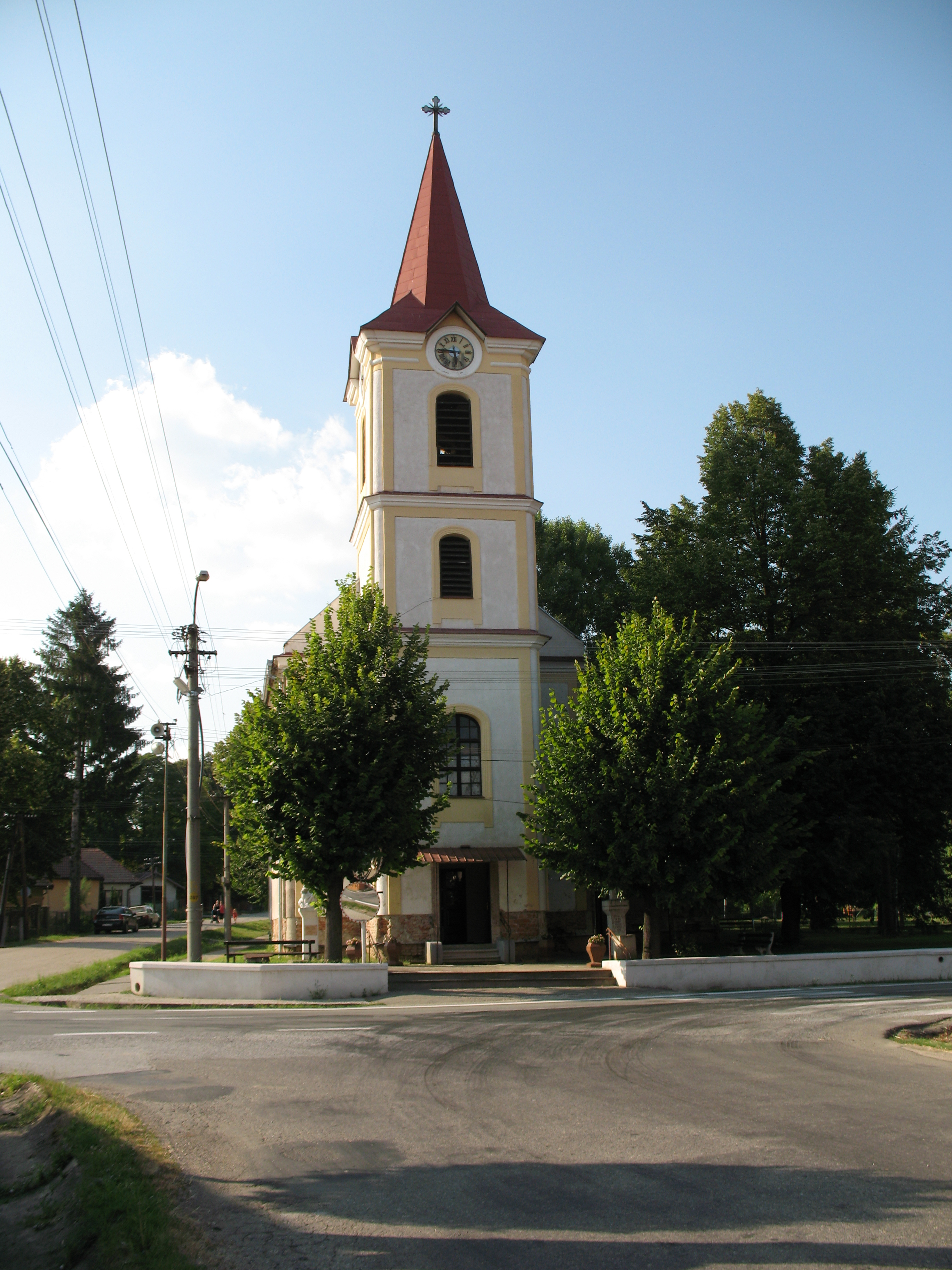 Kolta